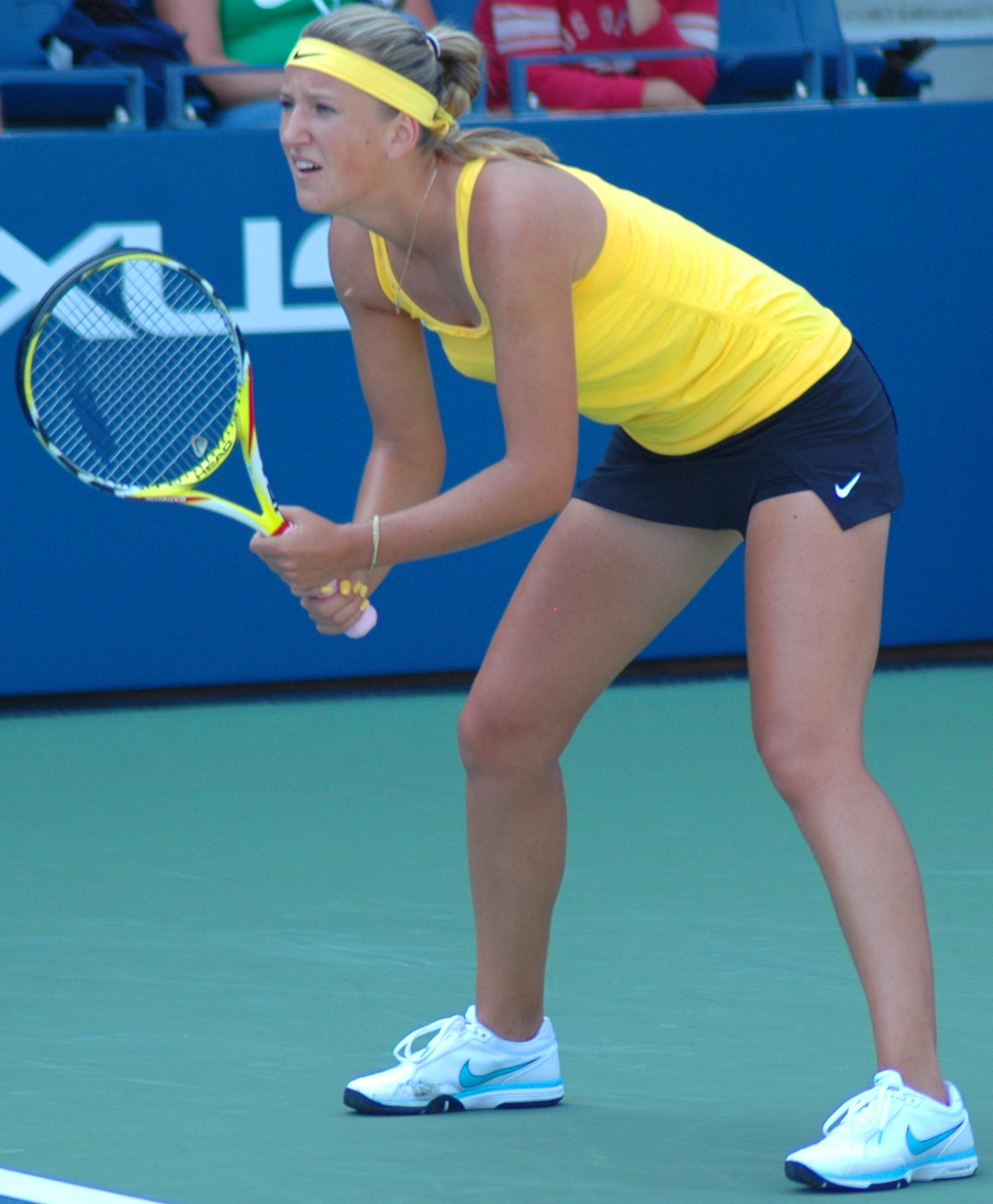 Victoria Azarenka US Open 2009